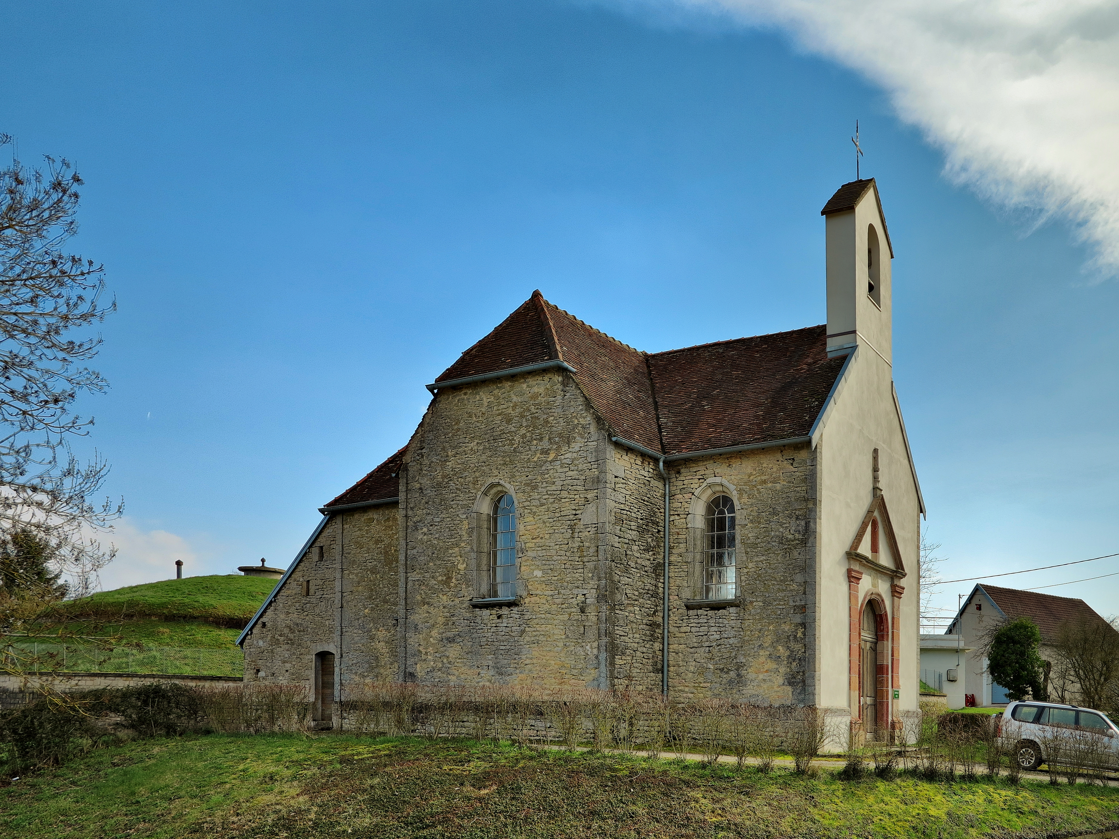 La chapelle